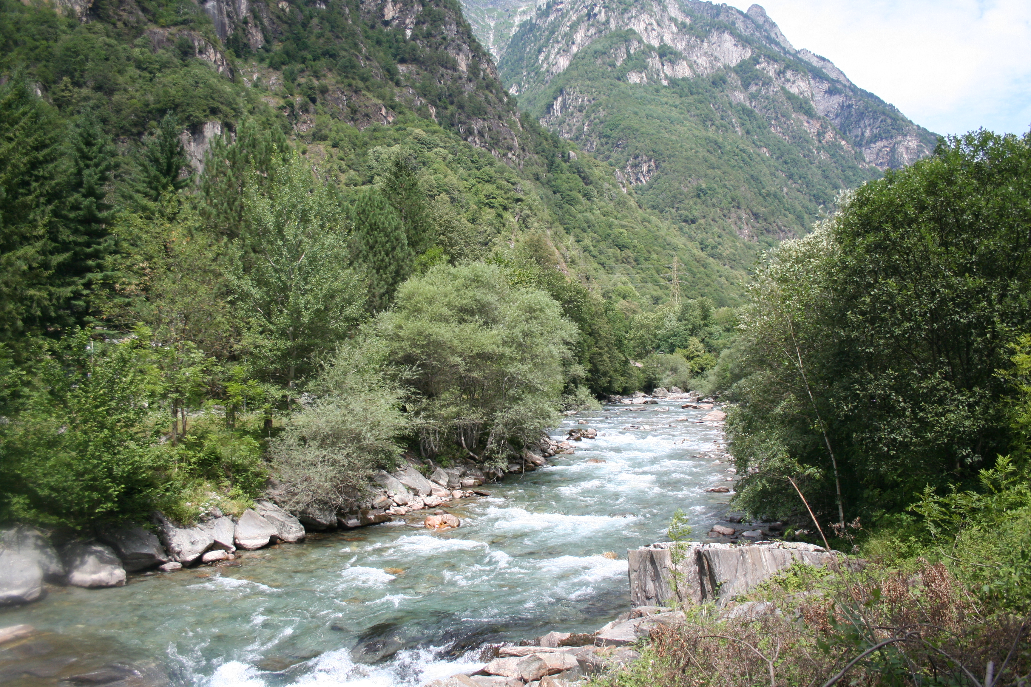 Moësa bei Norantola